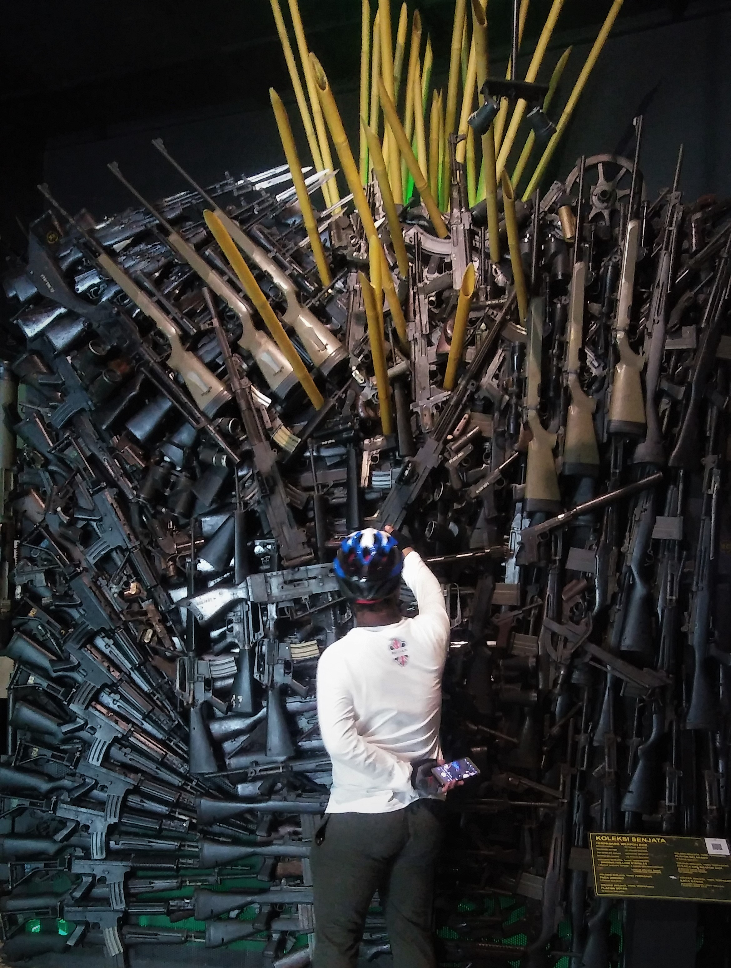 Weapon Box merupakan koleksi senjata yang pernah digunakan oleh tentara dalam memperjuangkan, mempertahankan dan mengisi kemerdekaan Indonesia. Jumlahnya ada 759 senjata dan 294 amunisi